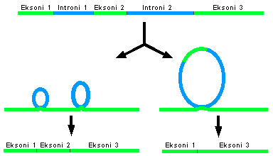 Alternative splicing